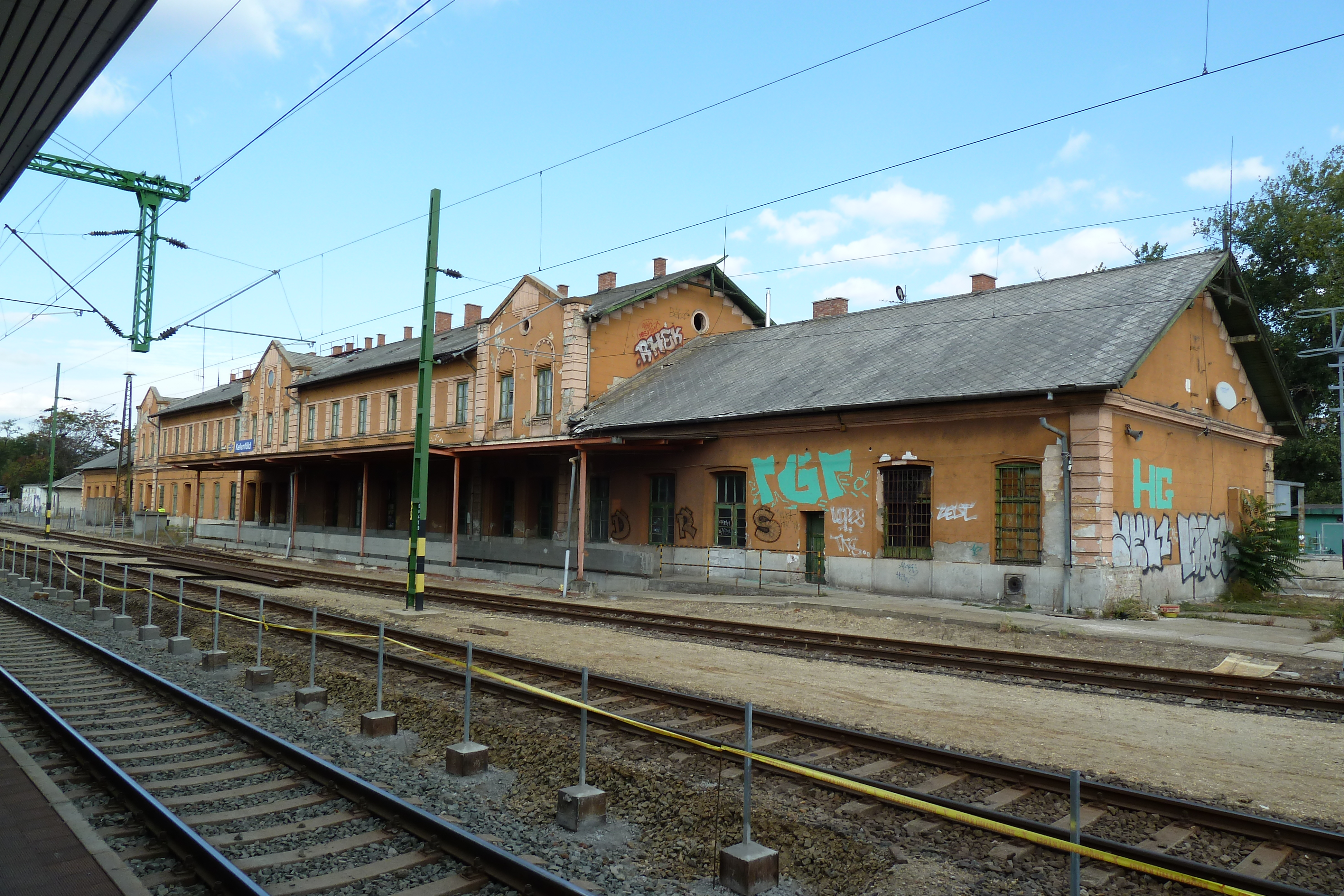 Kelenföldi pályaudvar forgalomirányító központja (Budapest 11, Etele tér 5-7.)